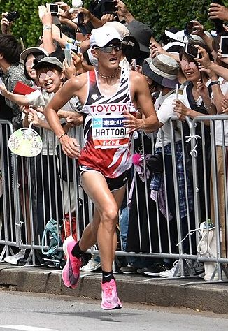 服部 勇馬